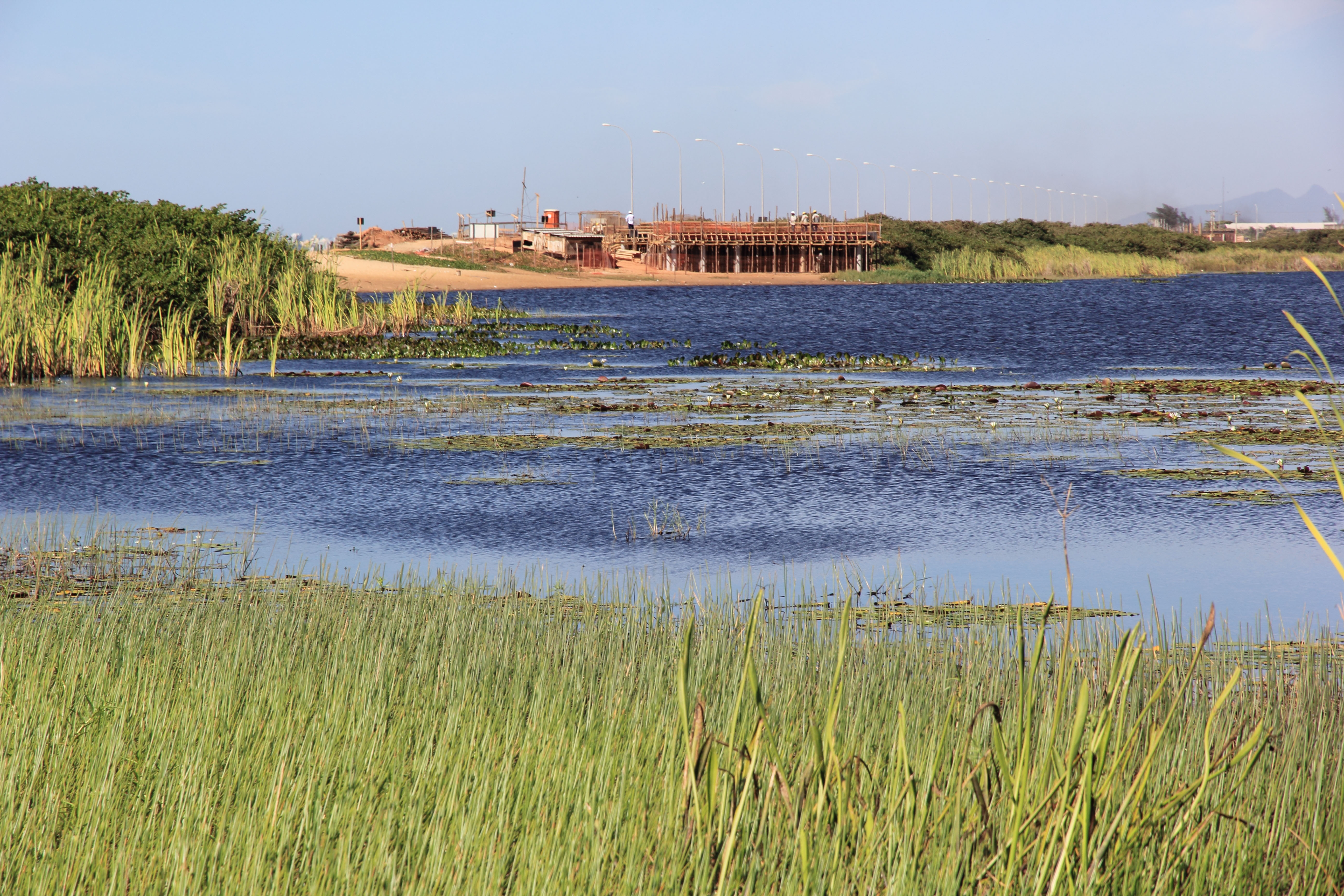 Parque Nacional da Restinga de Jurubatiba